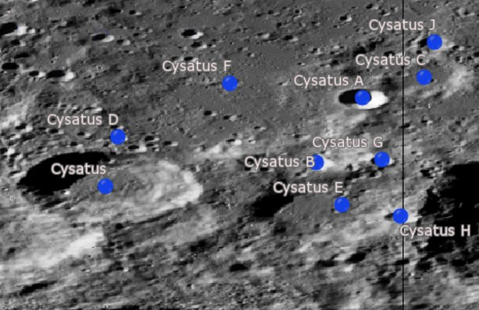 Cráter lunar Cysatus (LRO)